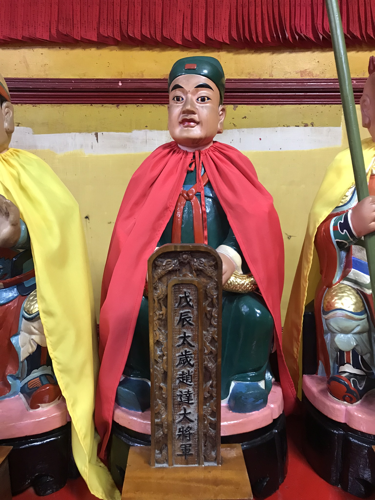 戊辰太歲趙達大將軍神像